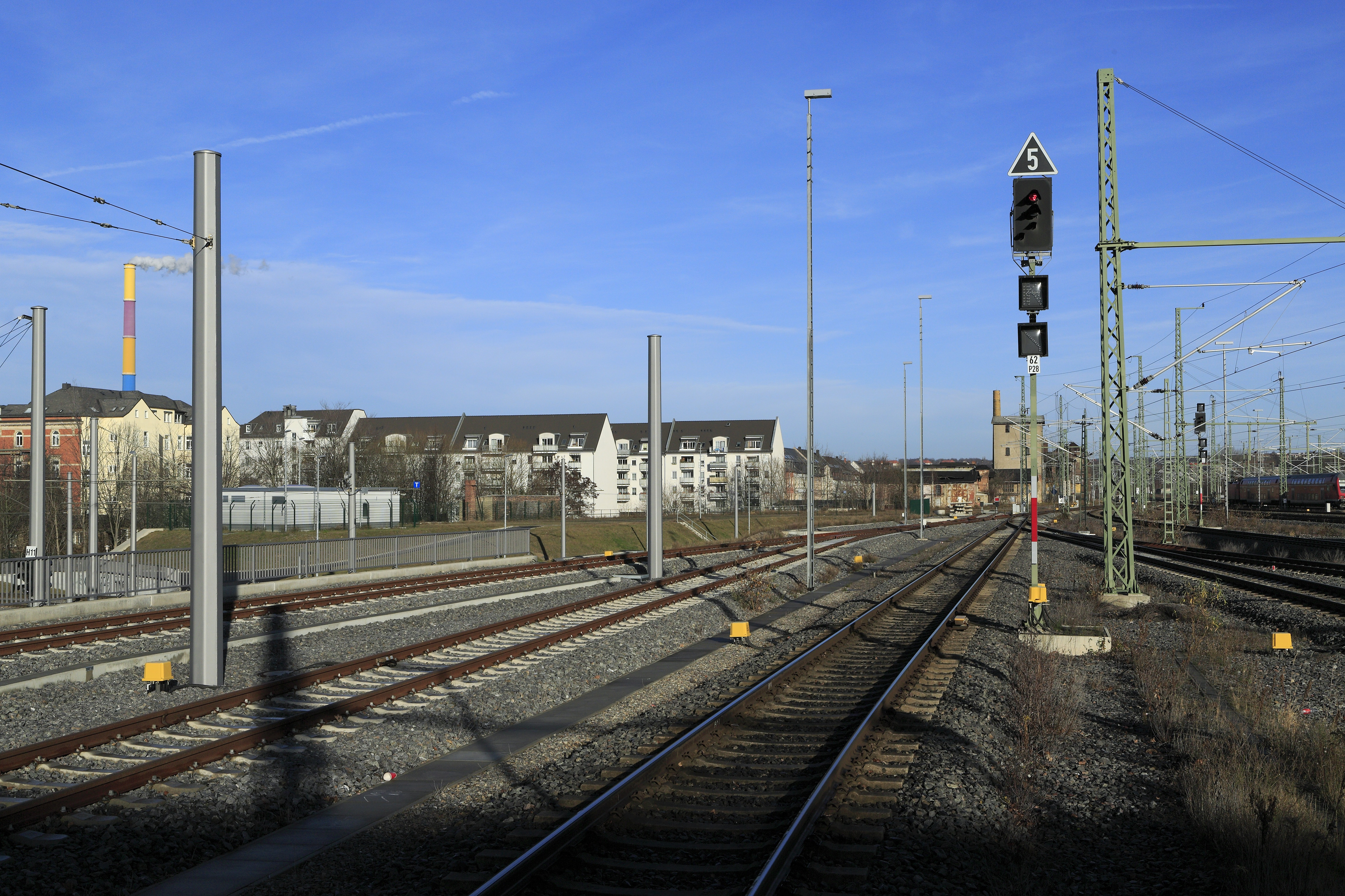 Verbindung zwischen Straßen- und Eisenbahnnetz mit Fahrdrahtlücke. Am Endmast links endet die Gleichspannungsfahrleitung, der Einsatz von Zweisystemfahrzeugen ist derzeit nicht vorgesehen. Ob der zusätzliche Mast doch eine Vorleistung für eine Systemtrennstelle ist, ist nicht zu erkennen. Das Gleis 28 (Bahnsteig 5) rechts daneben ist seit dem Umbau ebenfalls nicht mehr mit Fahrleitung überspannt.